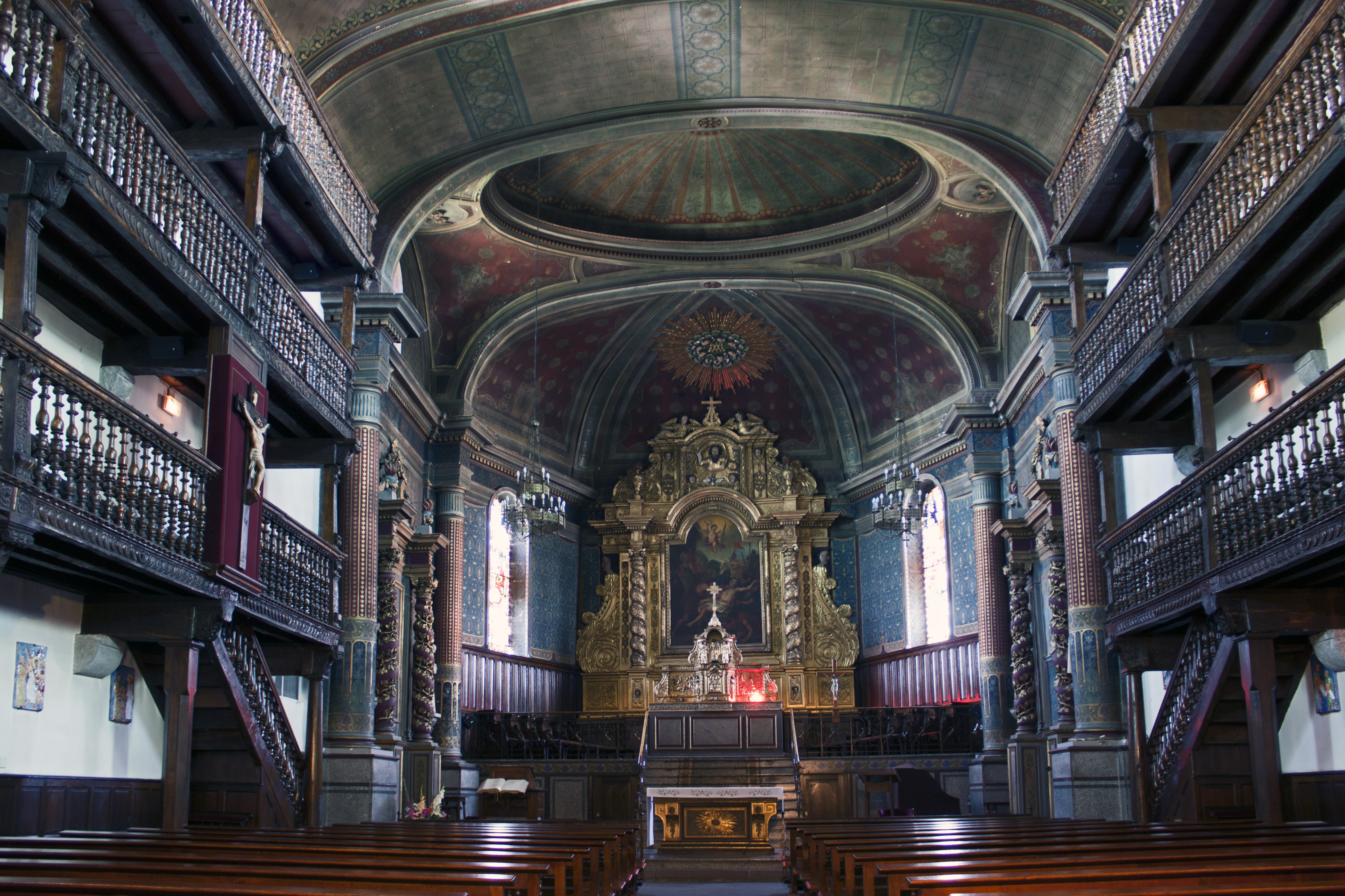 Nef de l'église saint Laurent, avec ses tribunes typiques du pays basque.